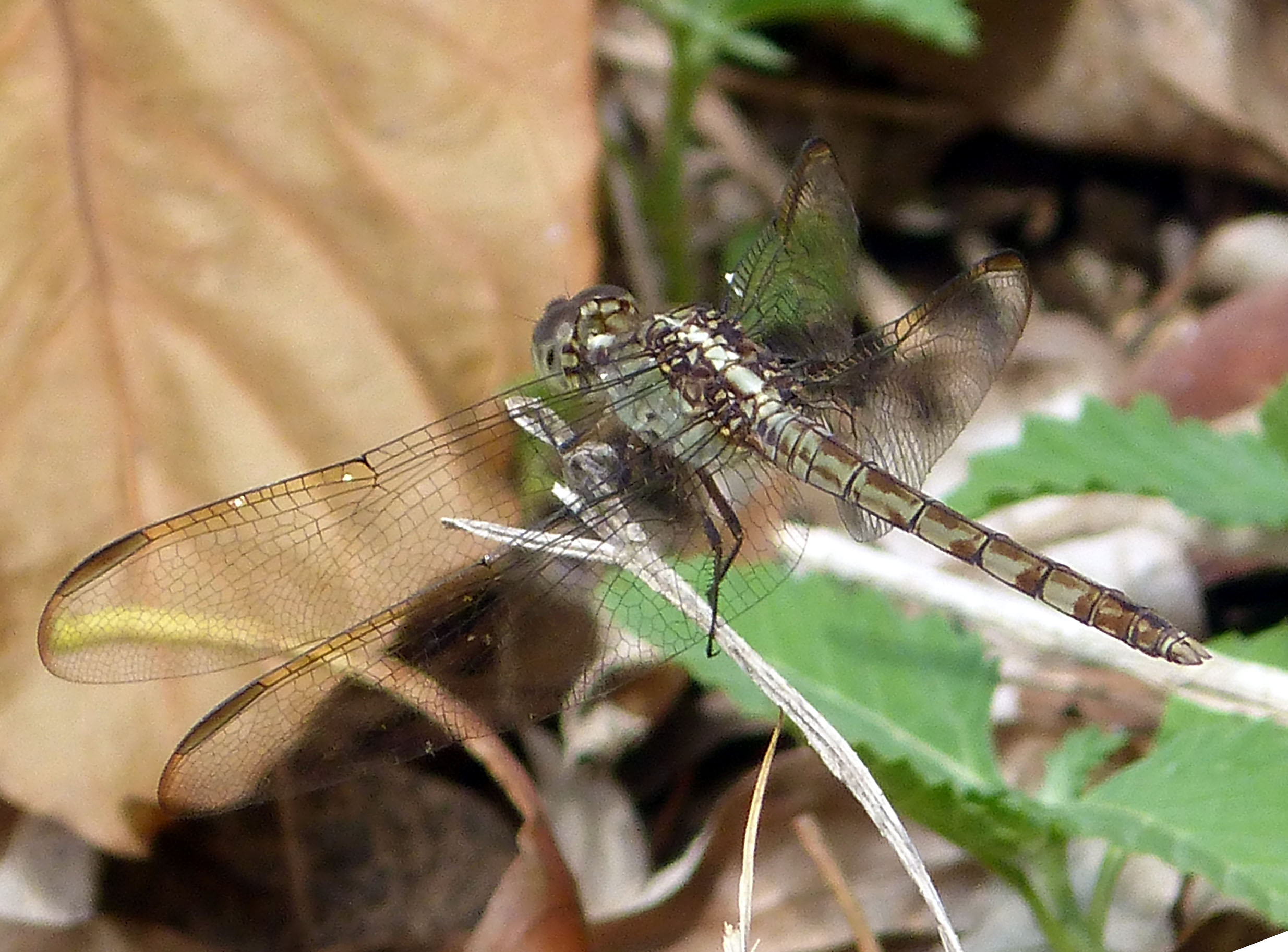 La Belen, Sierra de Najasa, Cuba